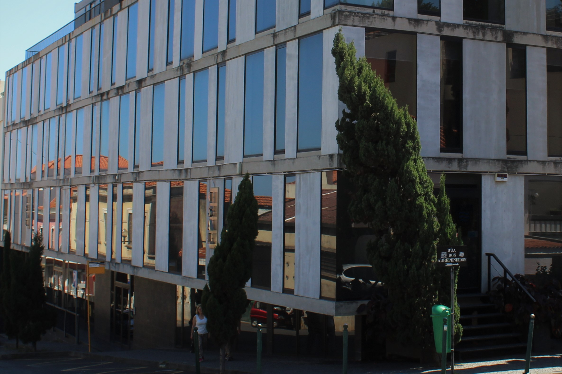 ISAL - Vista Exterior